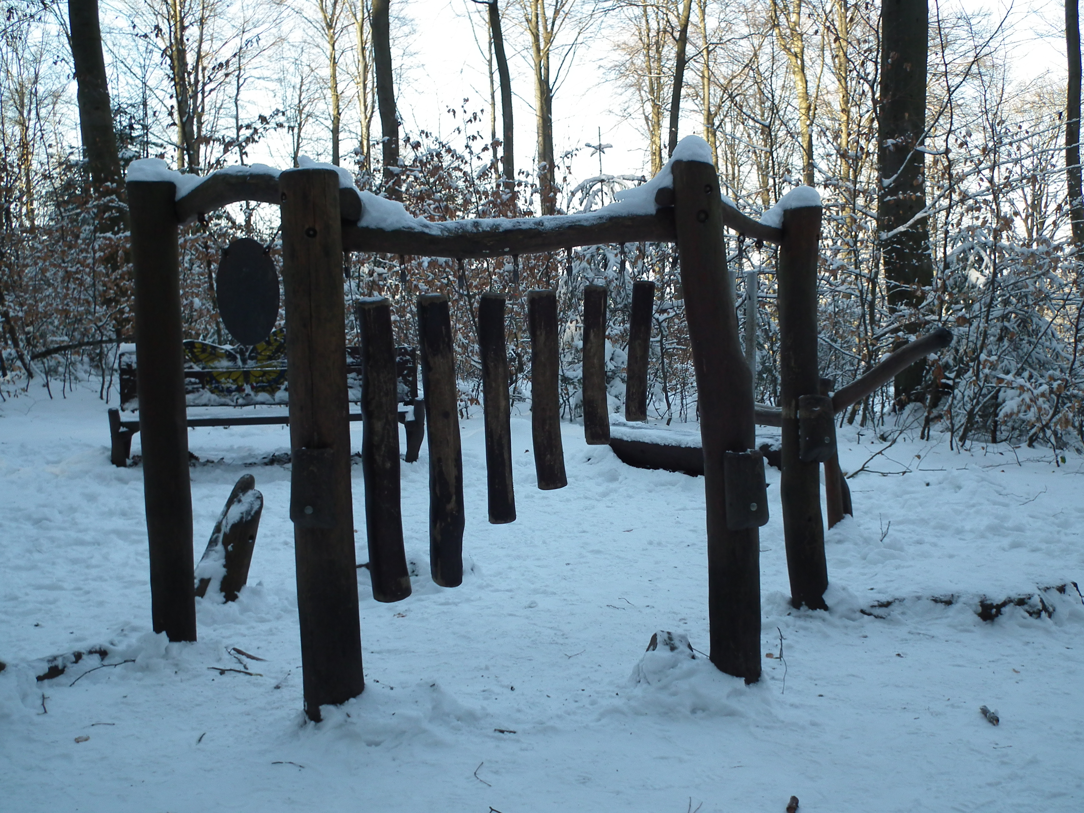 Klangspiel auf dem Waldlehrpfad auf dem Heidelberger Königstuhl (Baden-Württemberg, Deutschland)